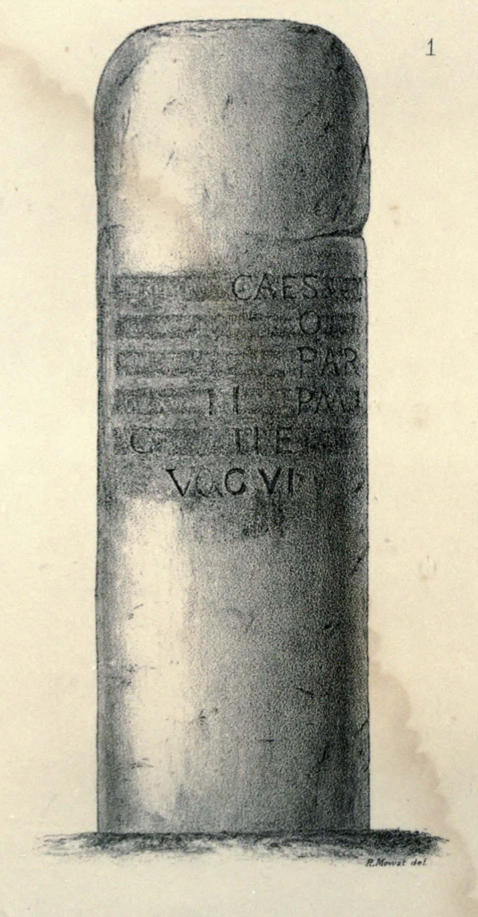 Relevé, par Robert Mowat, de la colonne itinéraire de Maël-Carhaix, 1874. Cf. CIL XVII2, 00412 = CIL 13, 09013 = CAG-22, p 188 = AE 1956, +00001 = AE 1957, +00211 : III IMP[3] / [3]CAE EV AR[3] / [3]CPF OSV[3] / [3]OTE V[3] / leug(as) VI[